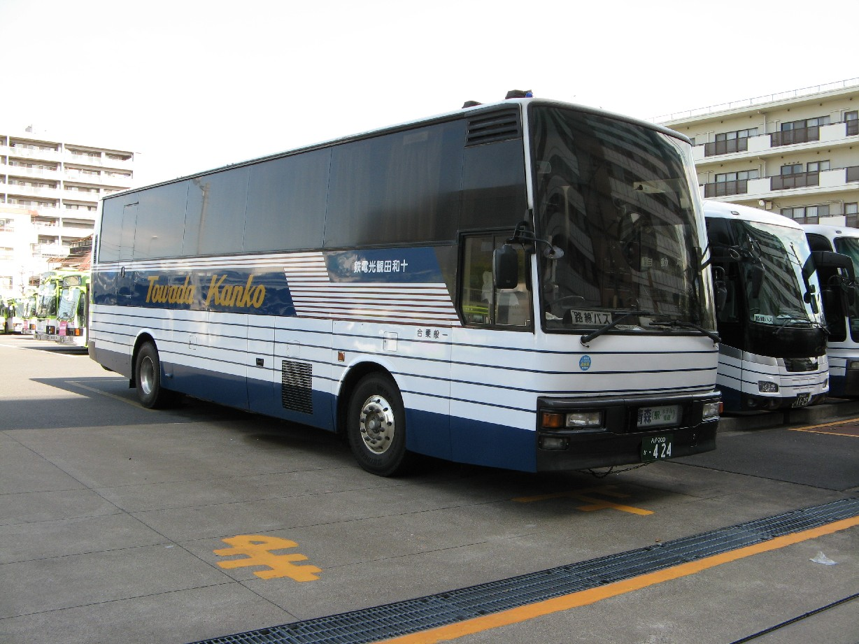 十和田観光電鉄バス八戸200か424。渋谷-池袋-青森間の高速バスブルースター号に投入される。国際興業志村営業所敷地外より撮影。